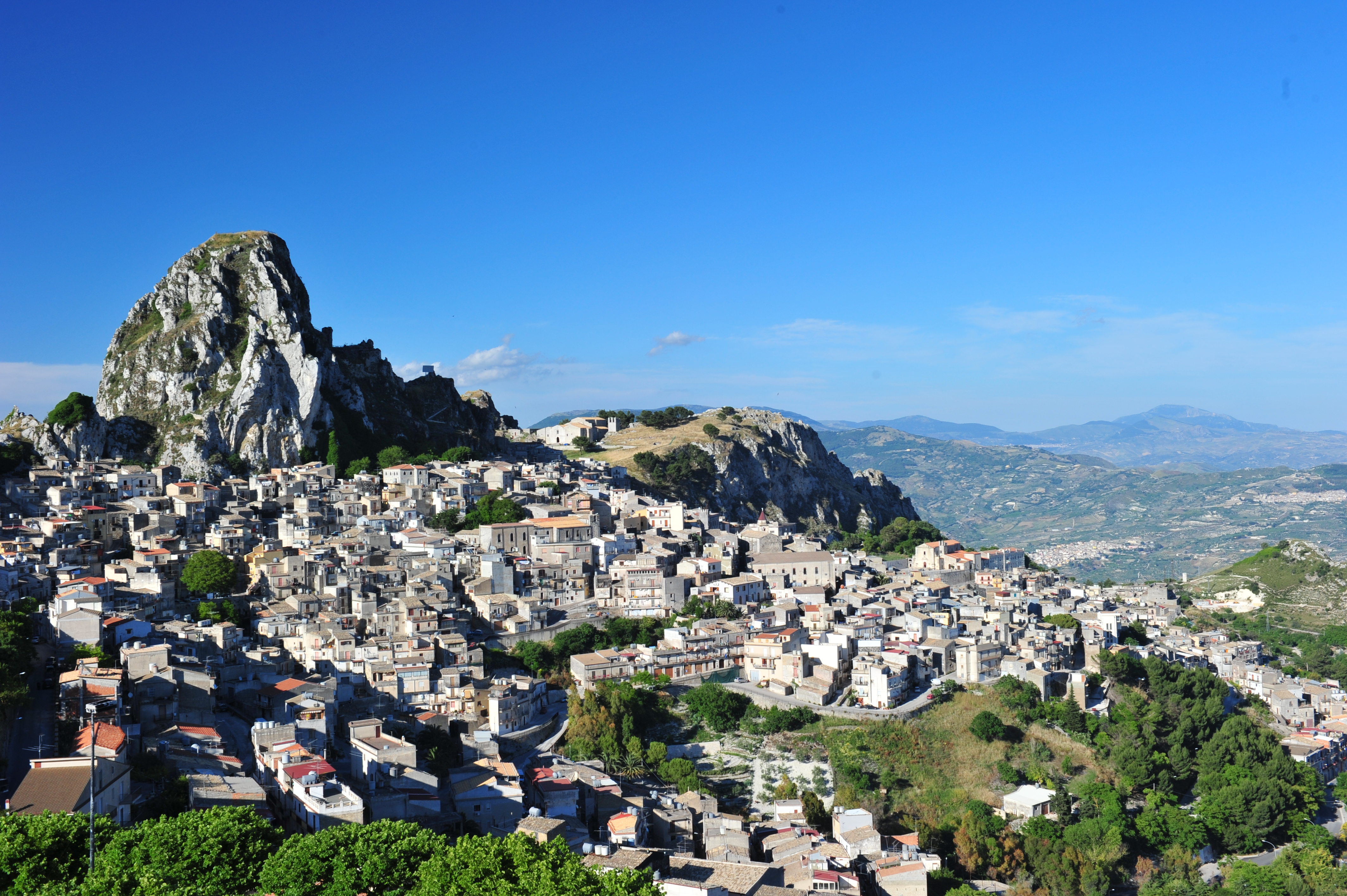 Caltabellotta, Sicilia giugno 2011